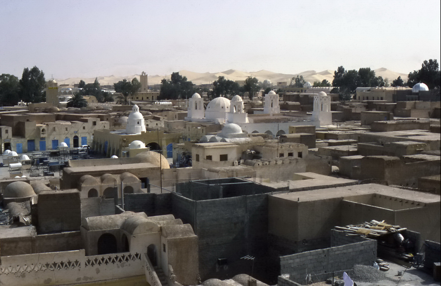 El Oued